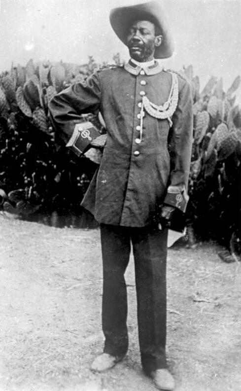 Samuel Maharero Südwest-Afrika